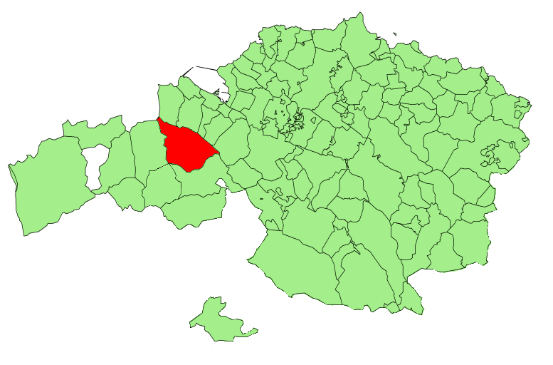 Situación de Galdames